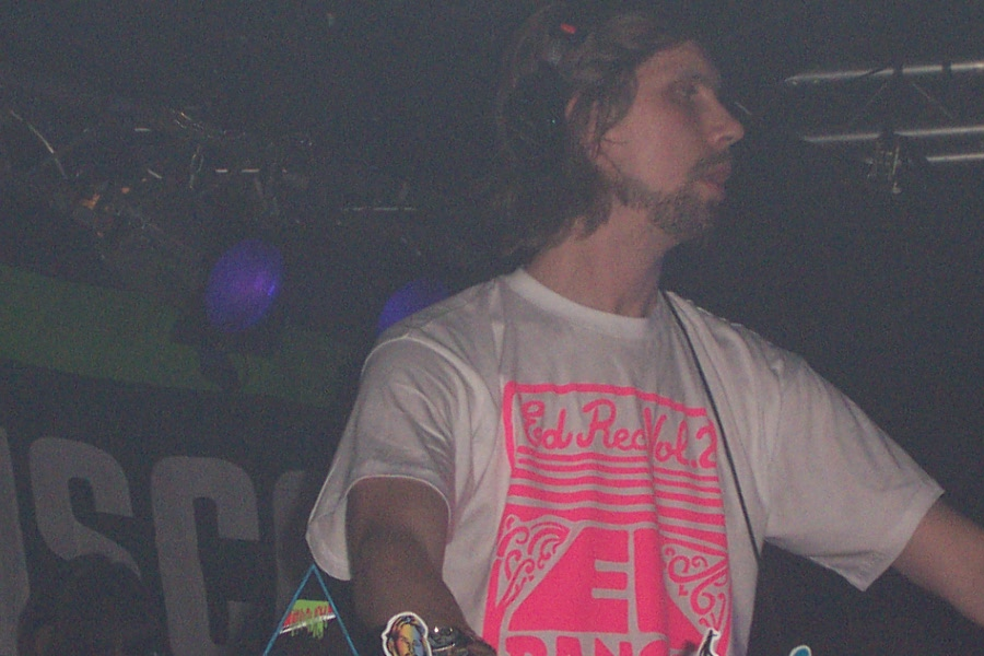 Busy P.